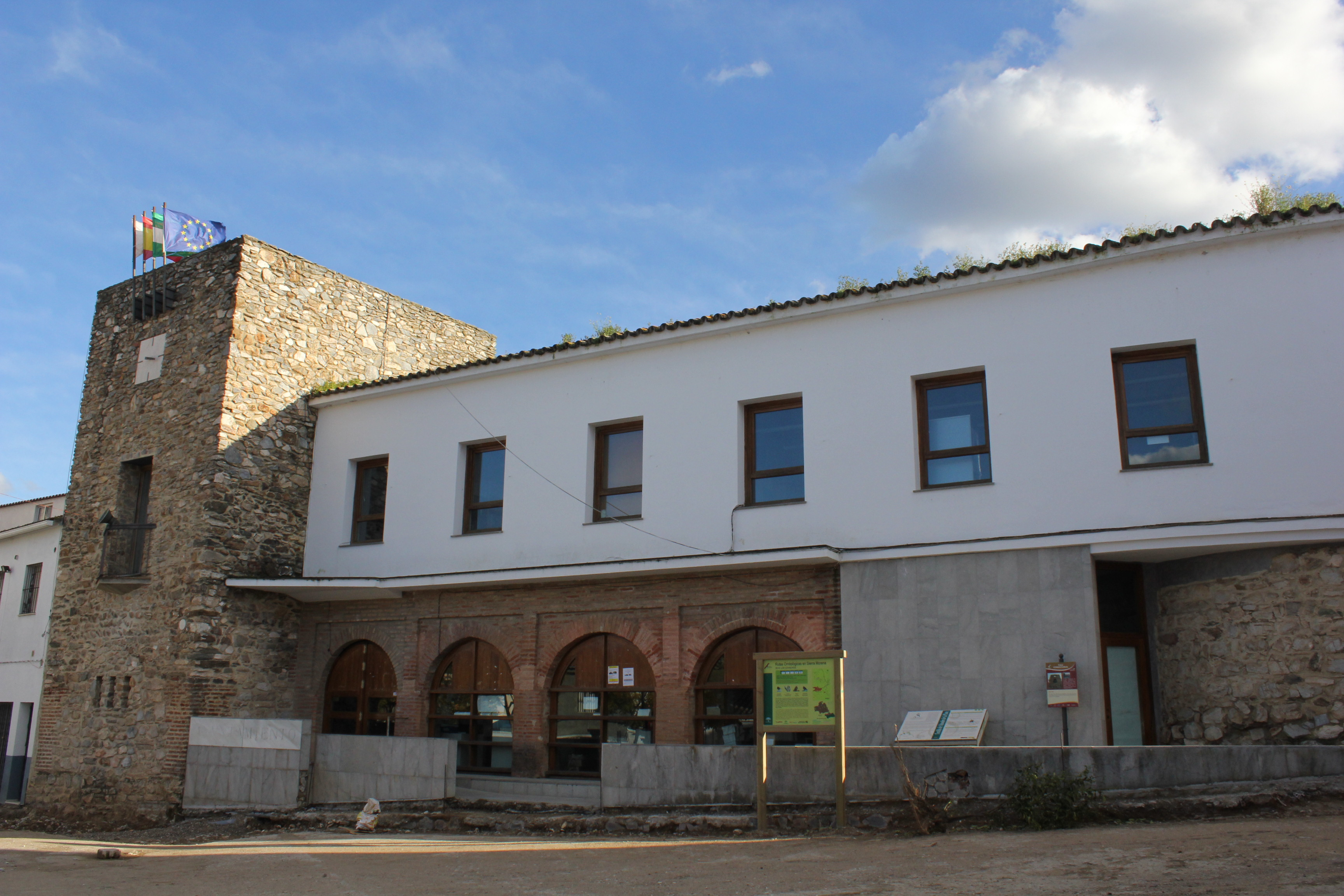 Vista frontal de los restos que quedan del Castillo